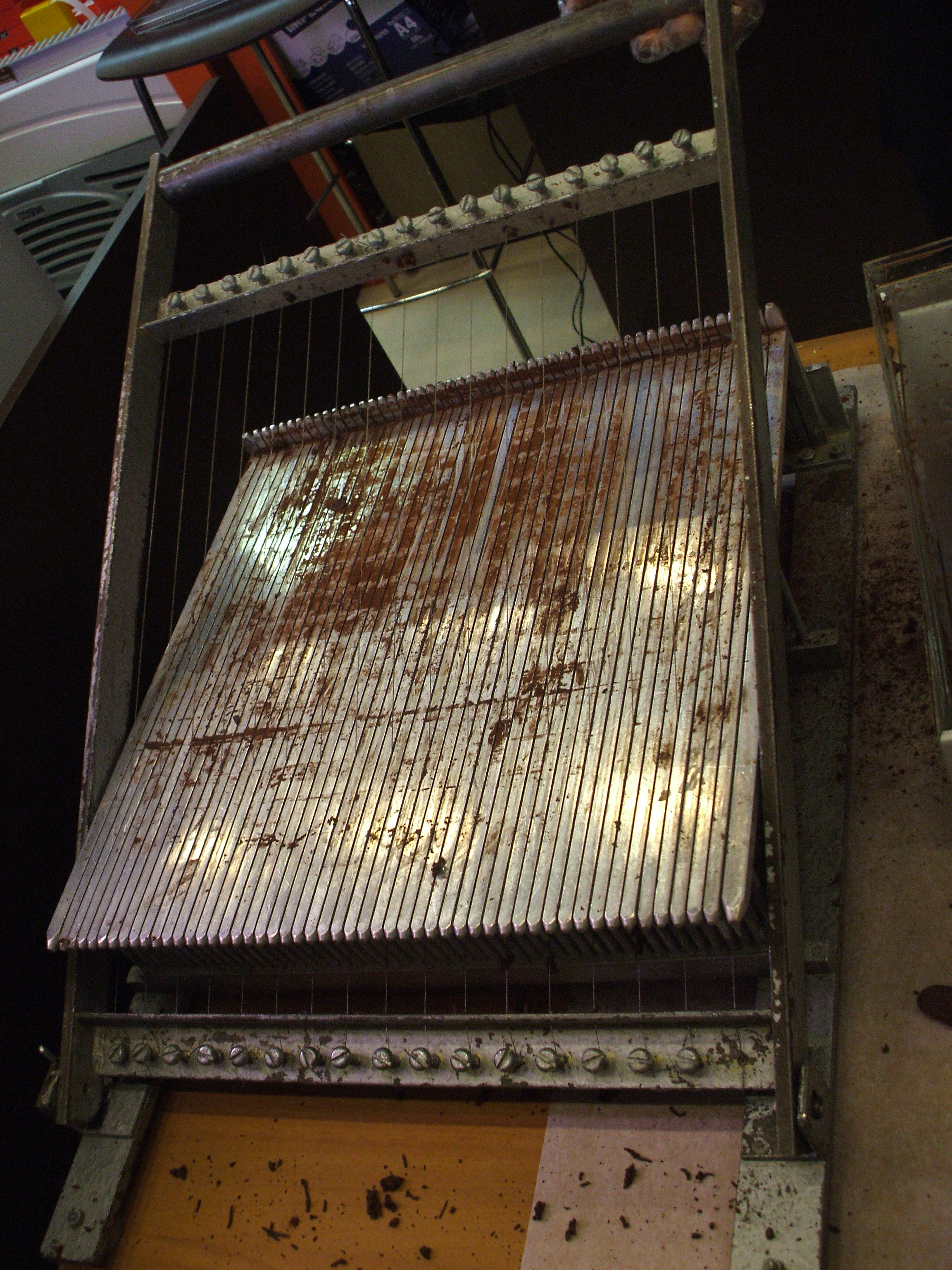 guitare à chocolat. ustensile de cuisine qui sert à découper régulièrement les pièces de chocolat, les pâtes de fruits, pâtes d'amande..